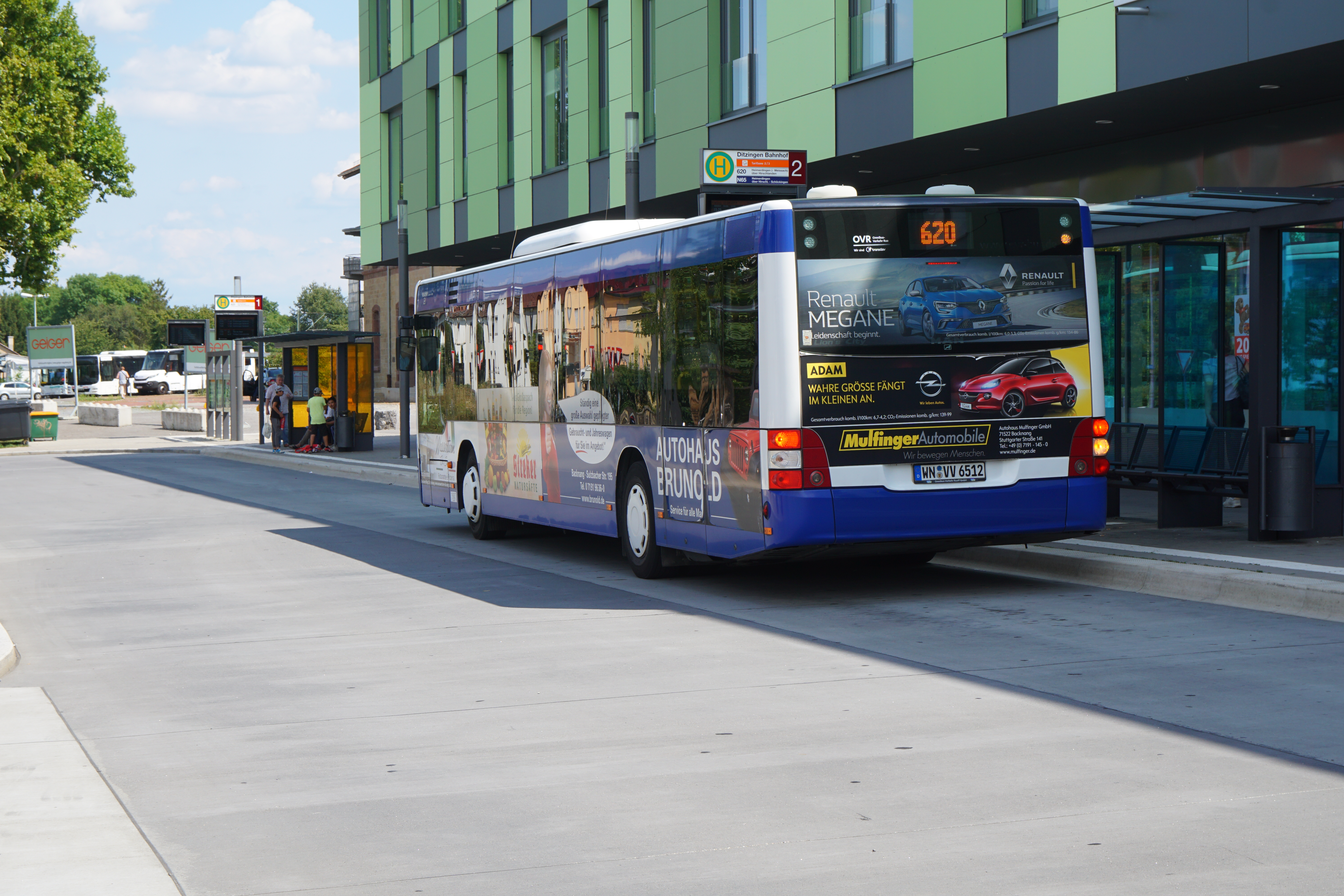 Bahnhof Ditzingen